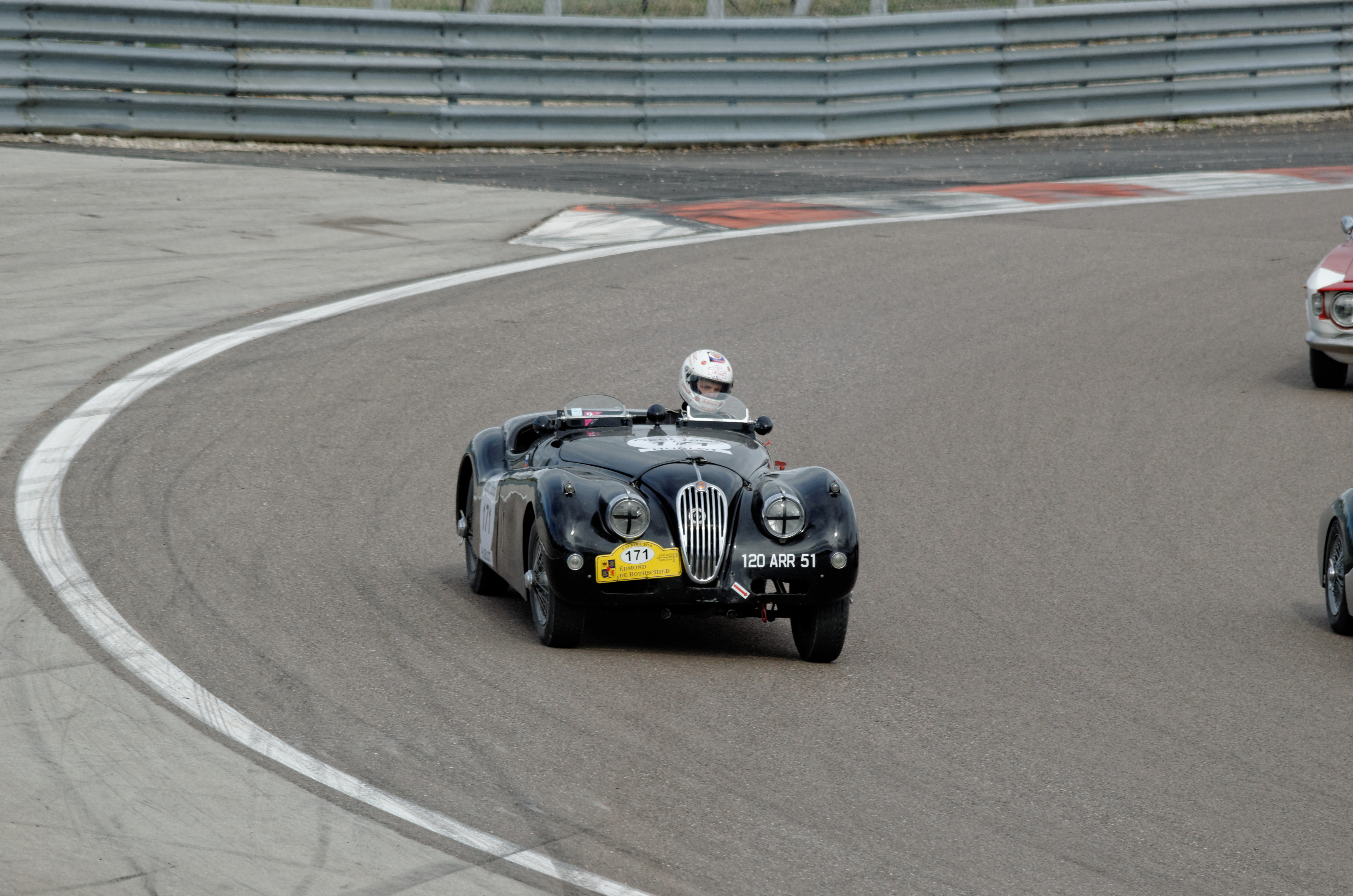 Jaguar XK 140, Tour Auto 2014, étape sur le Circuit de Prenois.